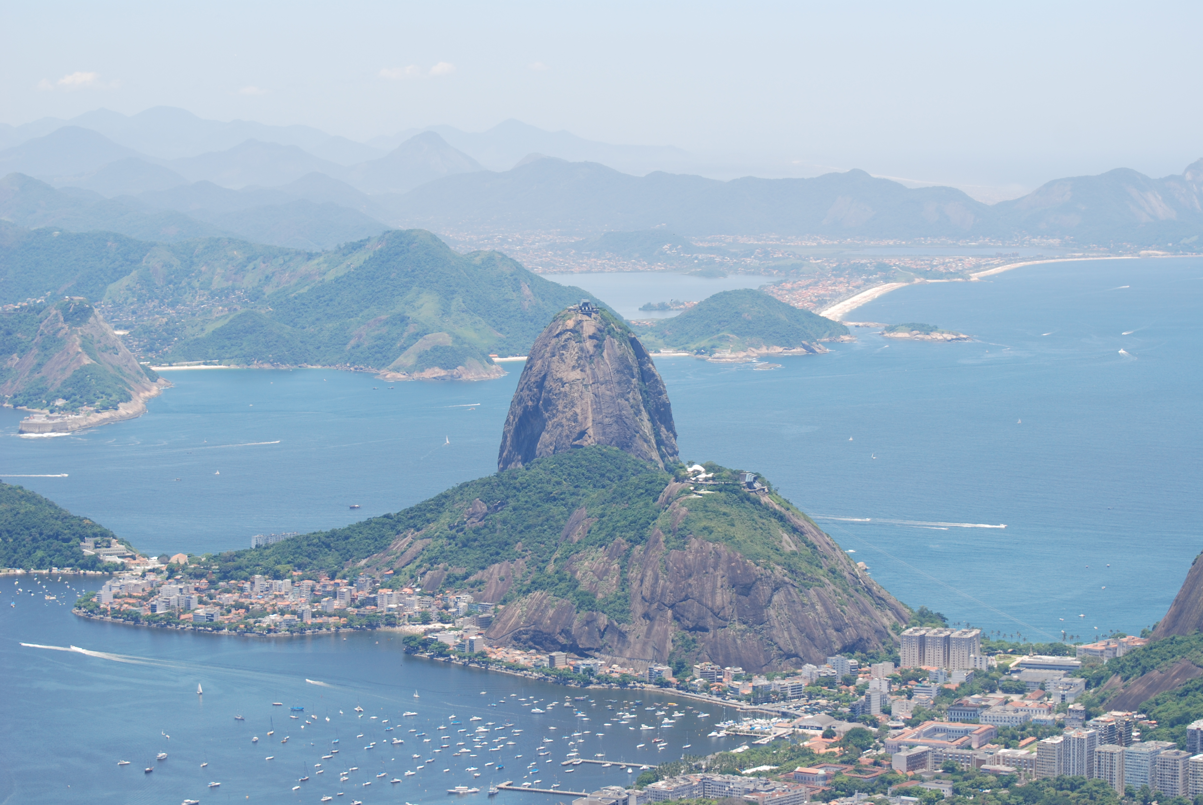 Sugarloaf Mountain as seen from Corcovado, Rio de Janeiro, Brazil